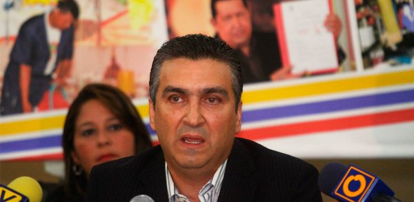 Foto de Miguel Perez Abad en rueda de prensa